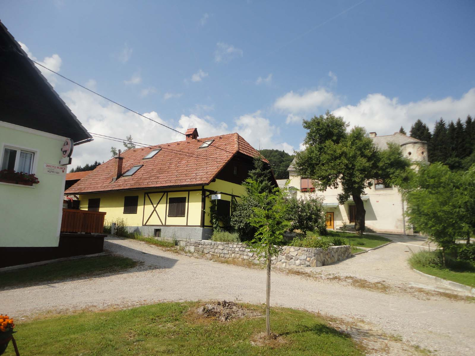 Koprivnik na Kočevskem: sedež zavoda za ohranitev kulturne dediščine Nesseltal/Koprivnik, ki ga vodi Matjaž Matko